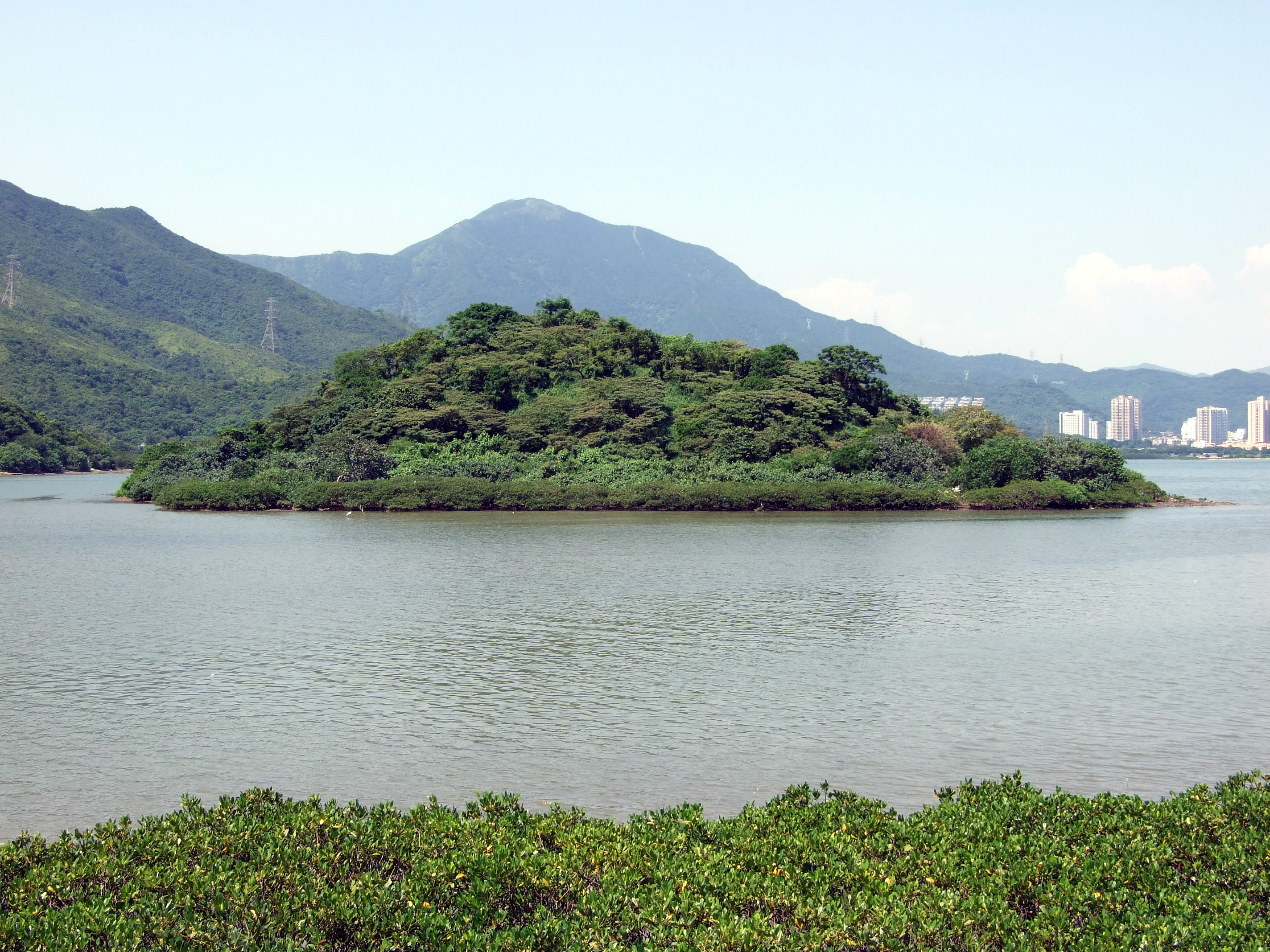 中文（香港）: 鴉洲